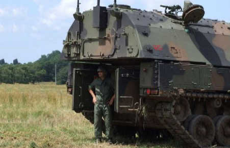 PzH dell'Esercito Italiano in caricamento munizioni